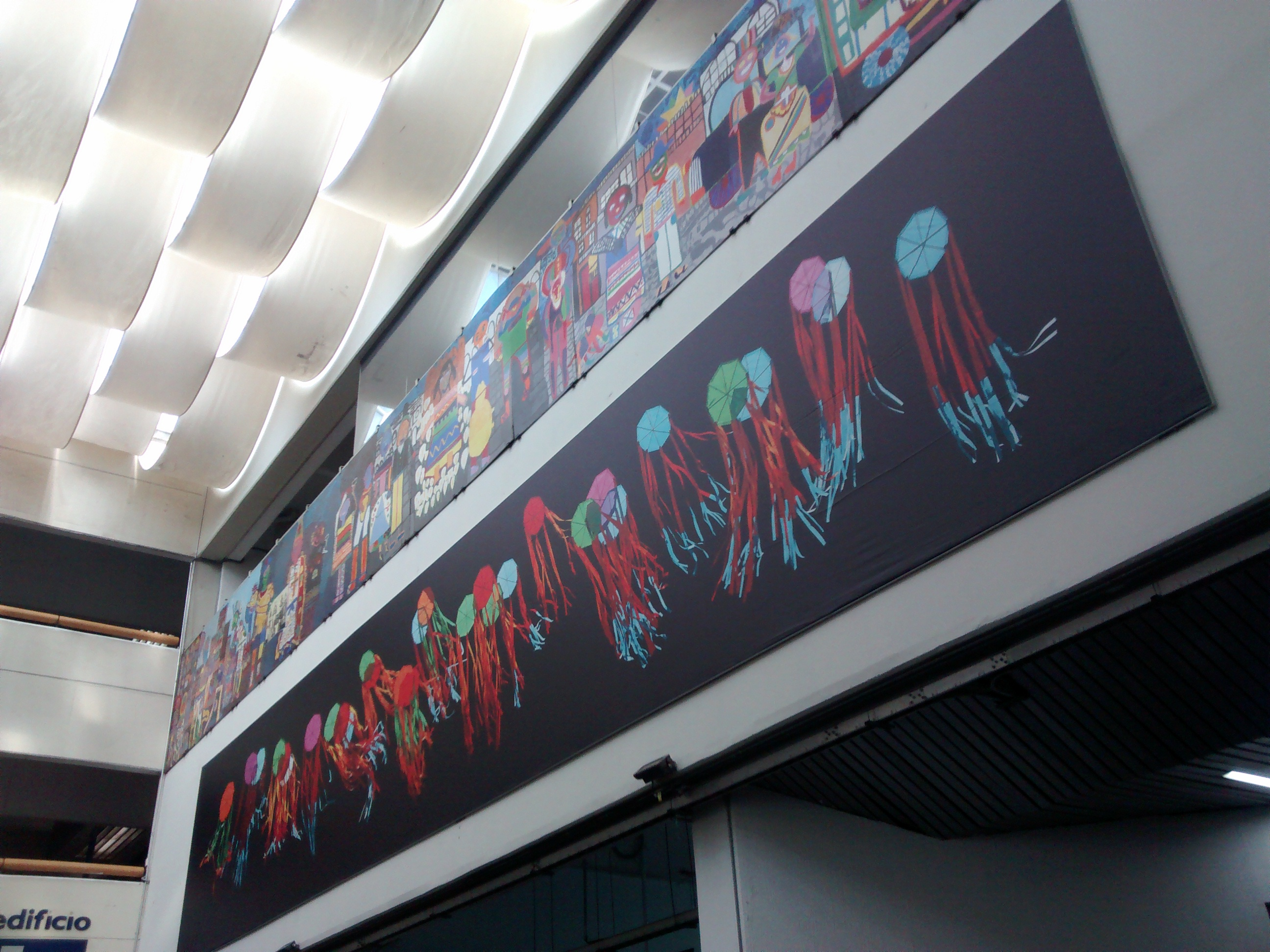 El vestíbulo de Universum se caracteriza por los dos murales que se encuentran en la entrada.